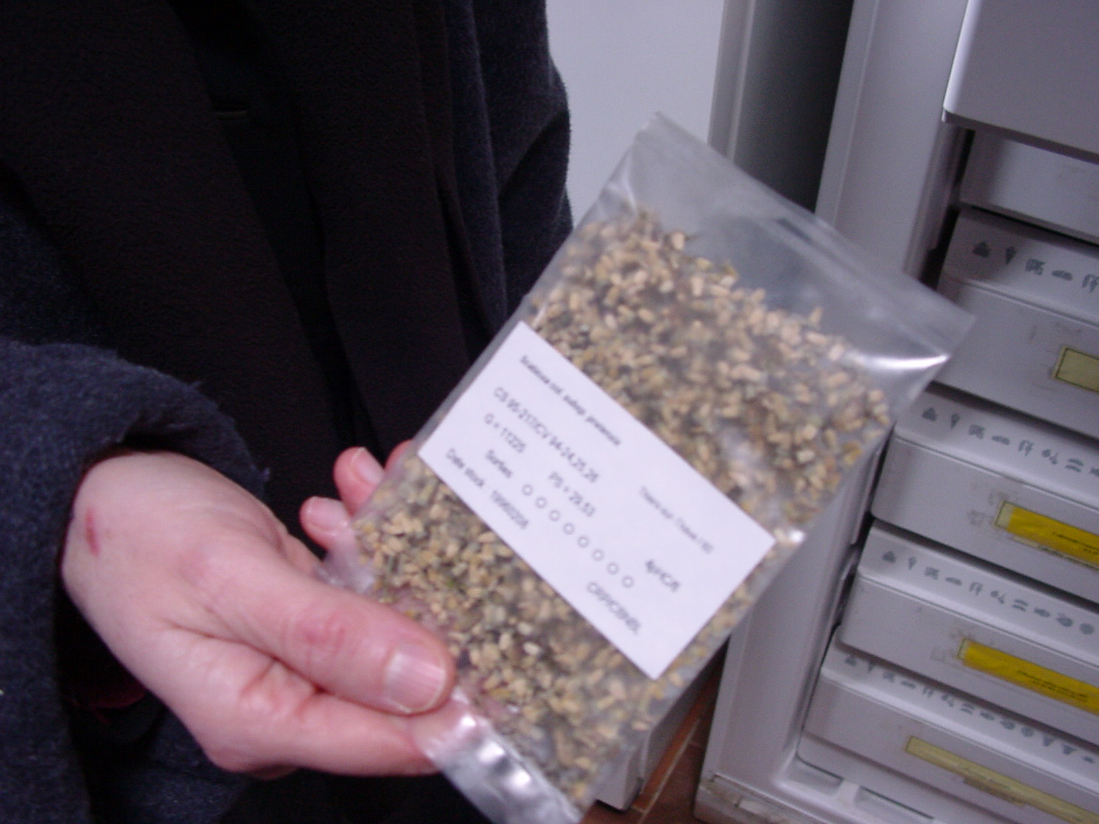 Conservatoire botanique national de Bailleul (CRP CBNB), conservation de graines (banque de gènes et semence)